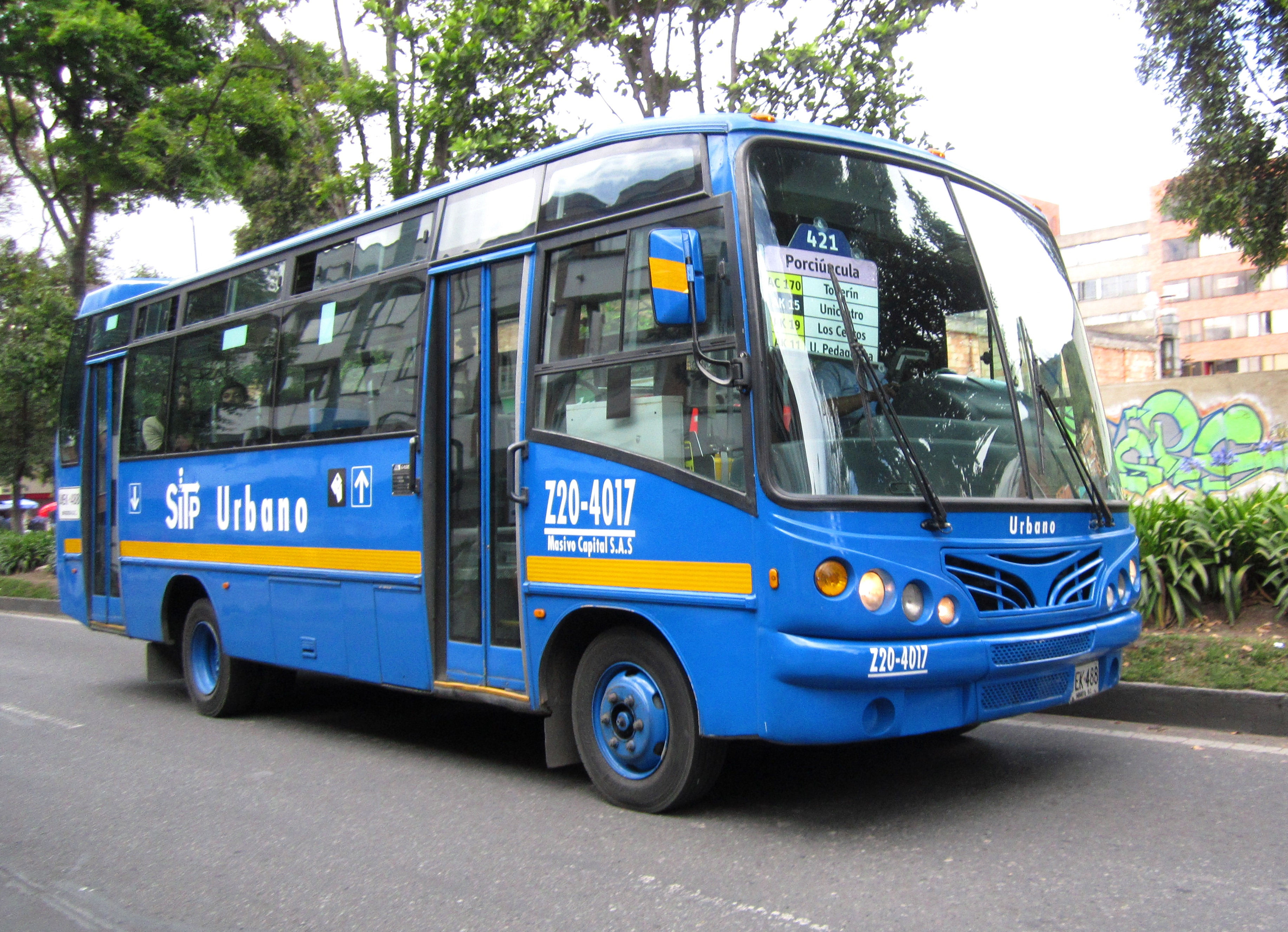 Bogotá - Bus del Sistema Integrado de Transporte Público (SITP) por la carrera 11